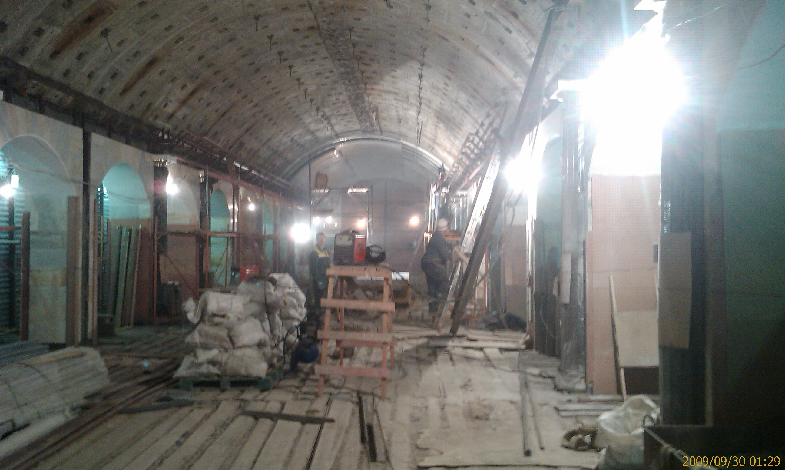 Строящаяся станция метро Адмиралтейская(Фрунзенско-Приморская линия), центральный зал.